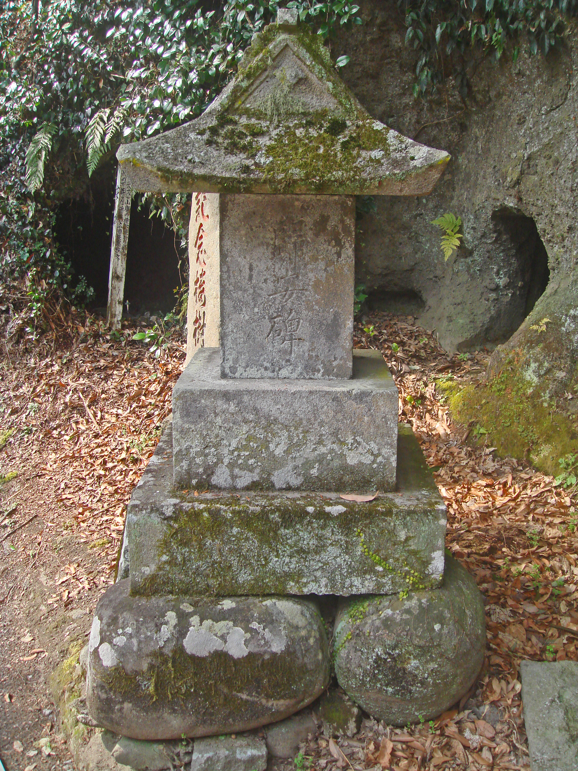 大分県日田市月隈公園の山腹にある「帰安碑」（きあんひ）の正面。 当該碑は供養塔で1818年西国筋郡代塩谷正義の建立である。永山道修復の掘削中に出土した人骨の供養のために建てられた。文字は漢学者、廣瀬淡窓によるもの。